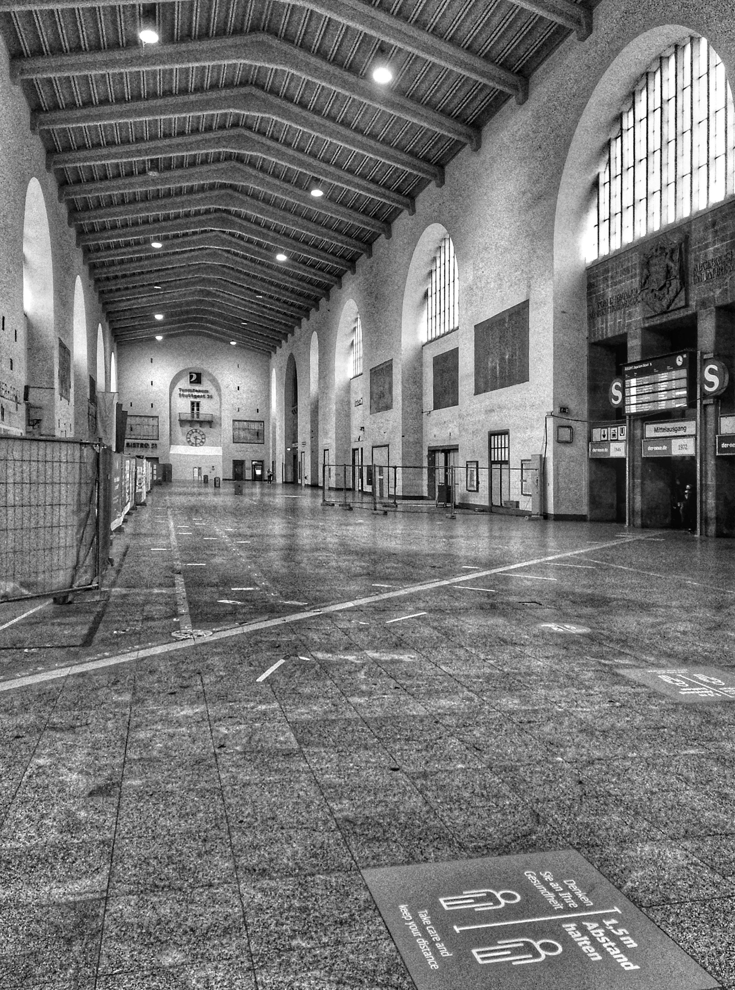 Haupthalle des Bahnhofsgebäudes nach der Räumung im Zuge der Bauarbeiten am Stuttgart-21-Projekt, 6. Juni 2020.